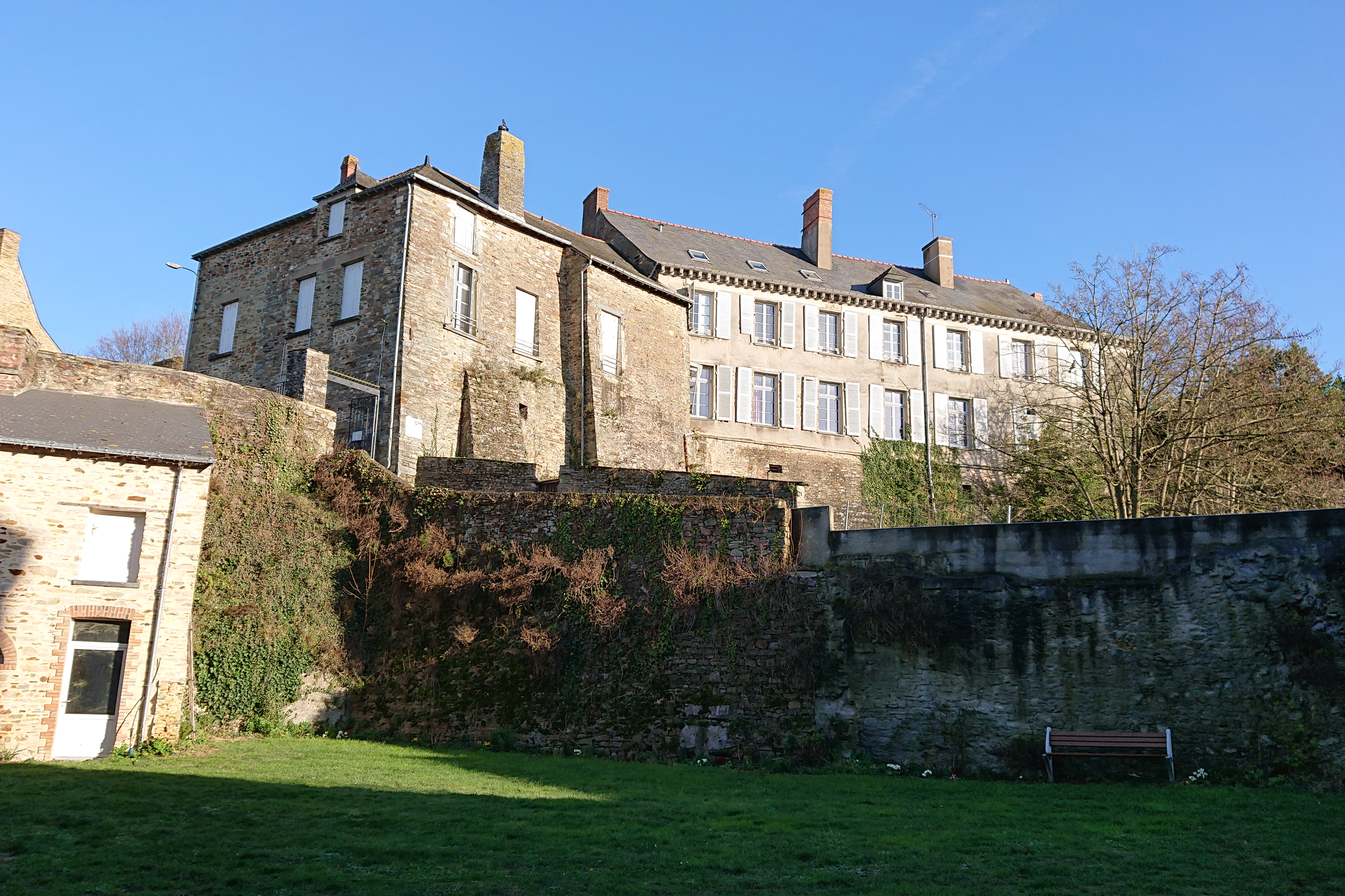 Vue depuis l'extérieur de l'ancienne sous-préfecture, Château de Châteaubriant, France.